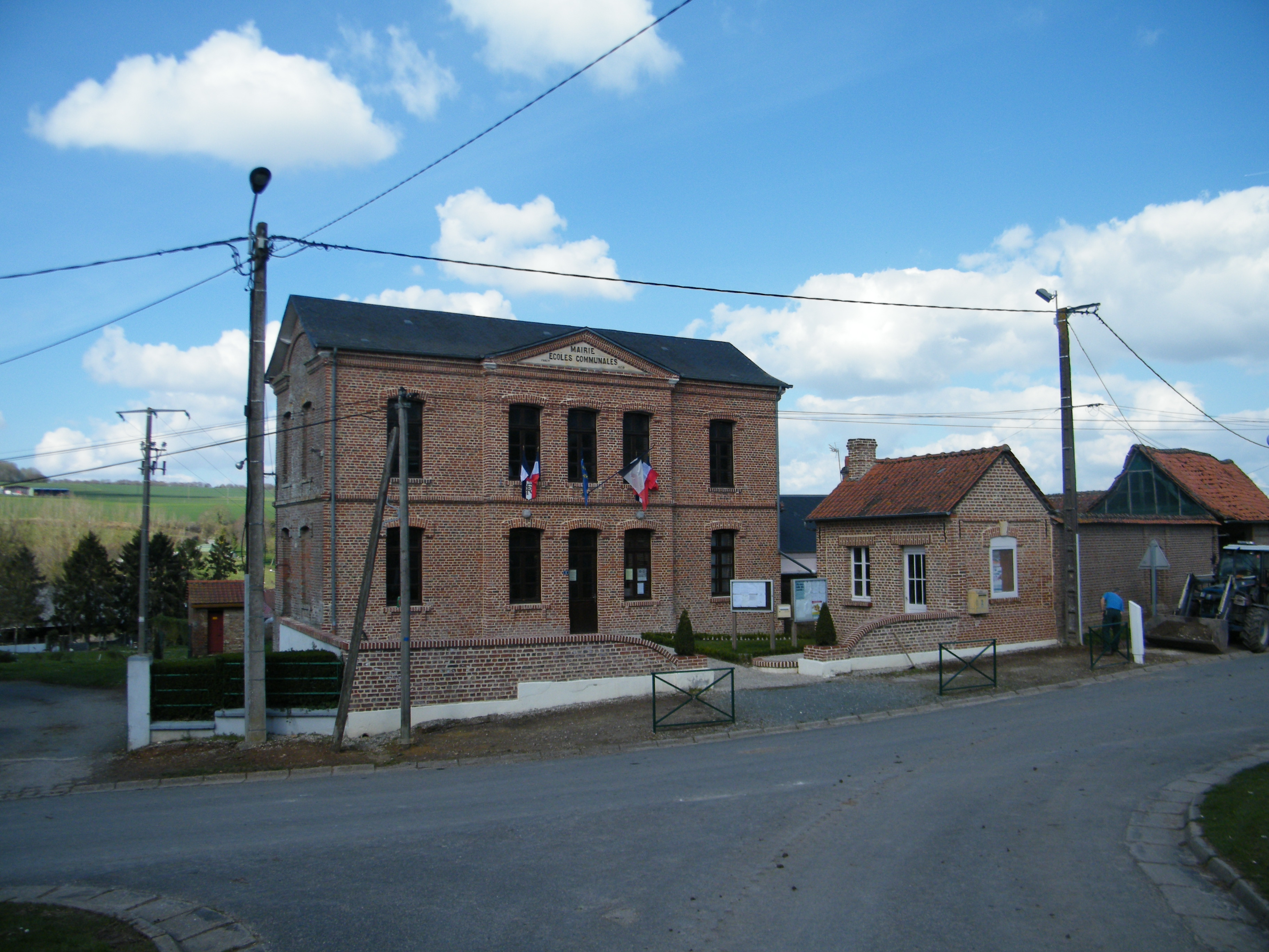 Bâtiments communaux.